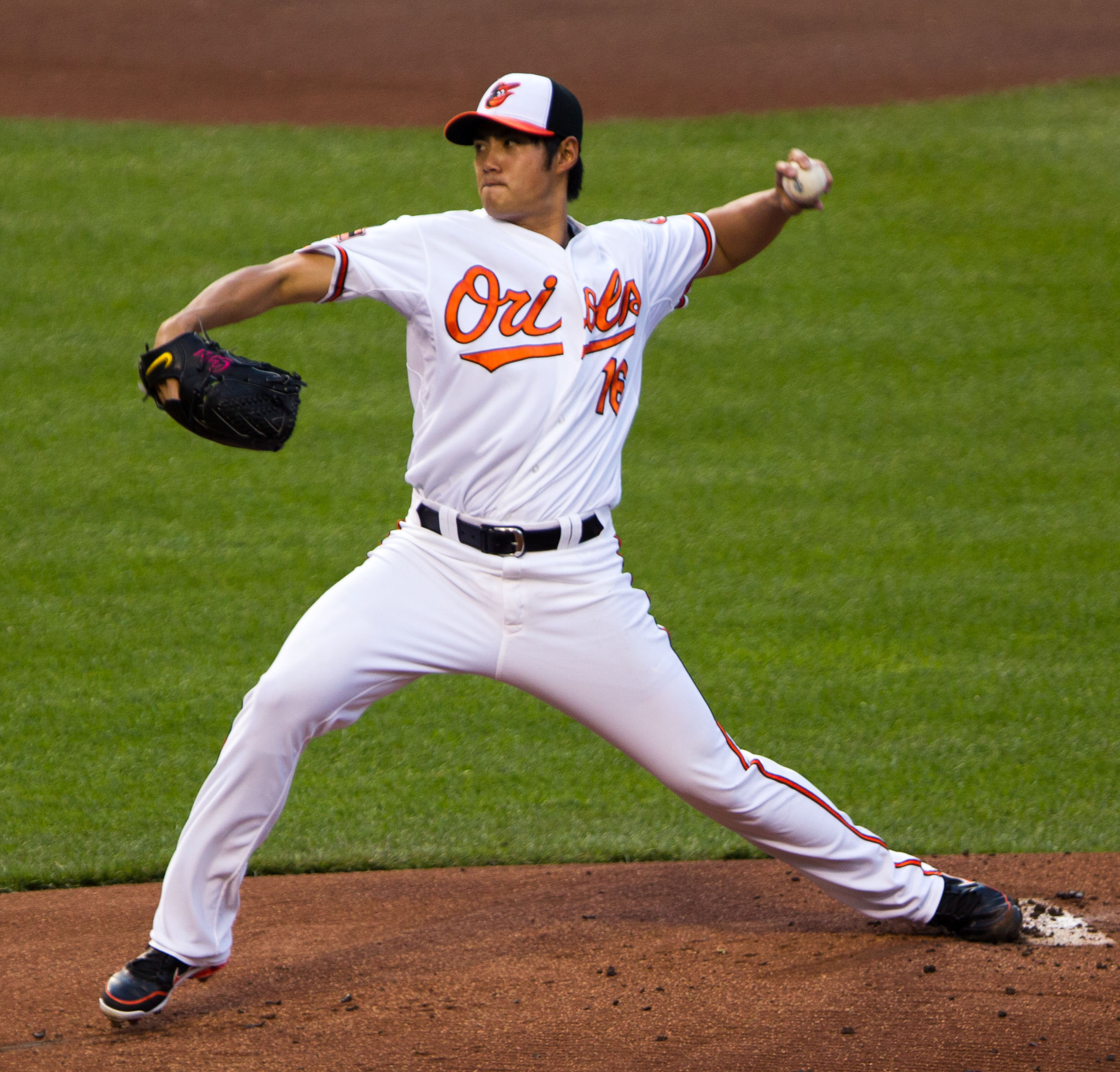 Wei-Yin Chen